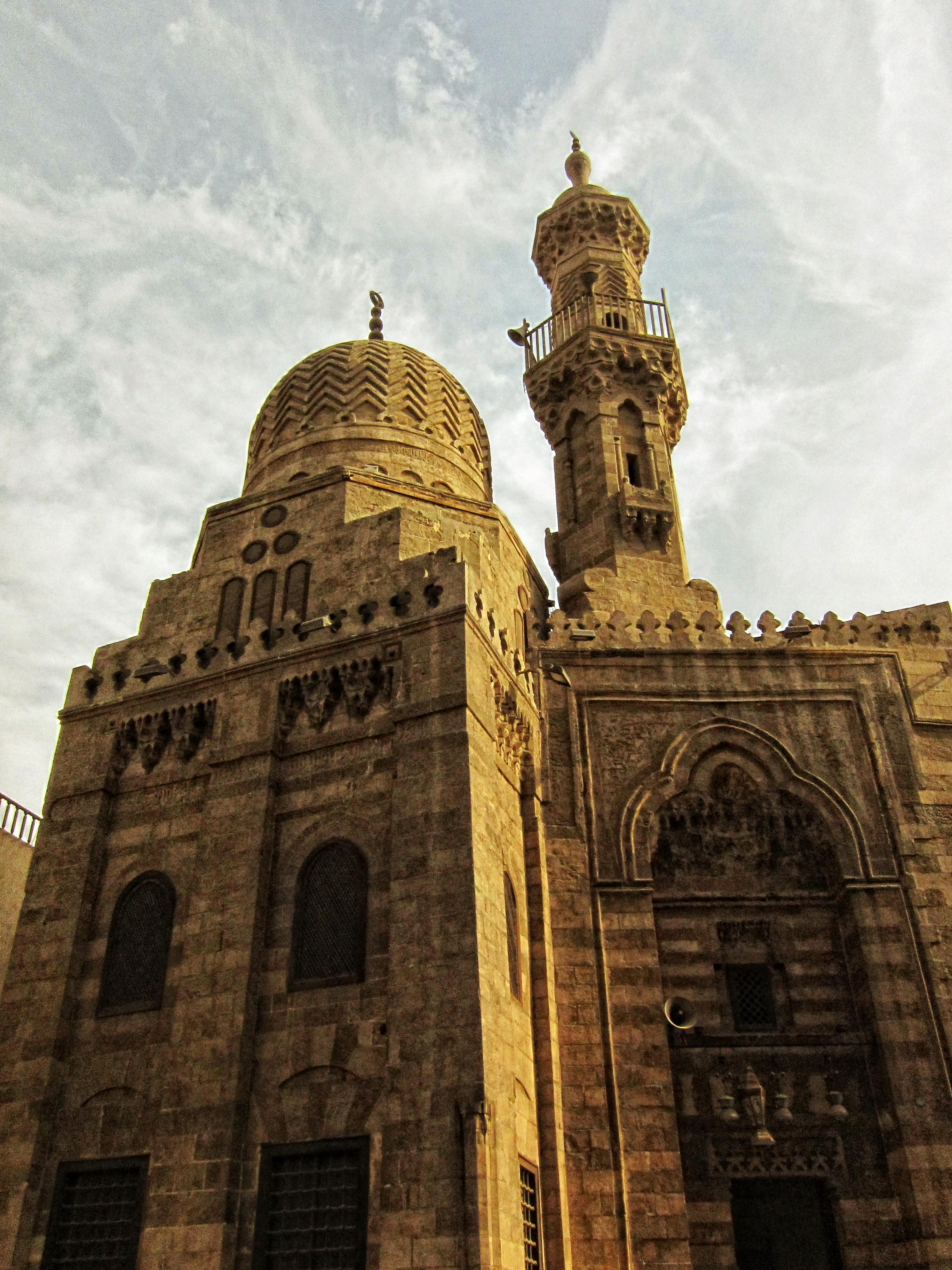 Masjid Emir Qanibay مسجد الأمير قانباي / Cairo / Egypt - 21 05 2010